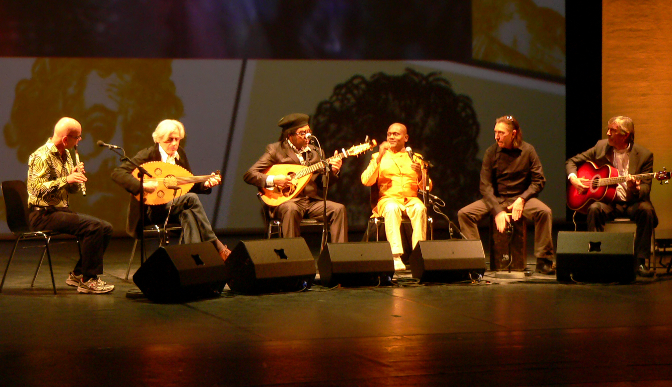 Auftritt der Dissidenten mit Gästen (Roman Bunka-Oud, Mickam Yogeswaran-Gesang, Noujoum Ouazza-Mandolincello) bei Gala zur Verleihung des Praetorius Musikpreis